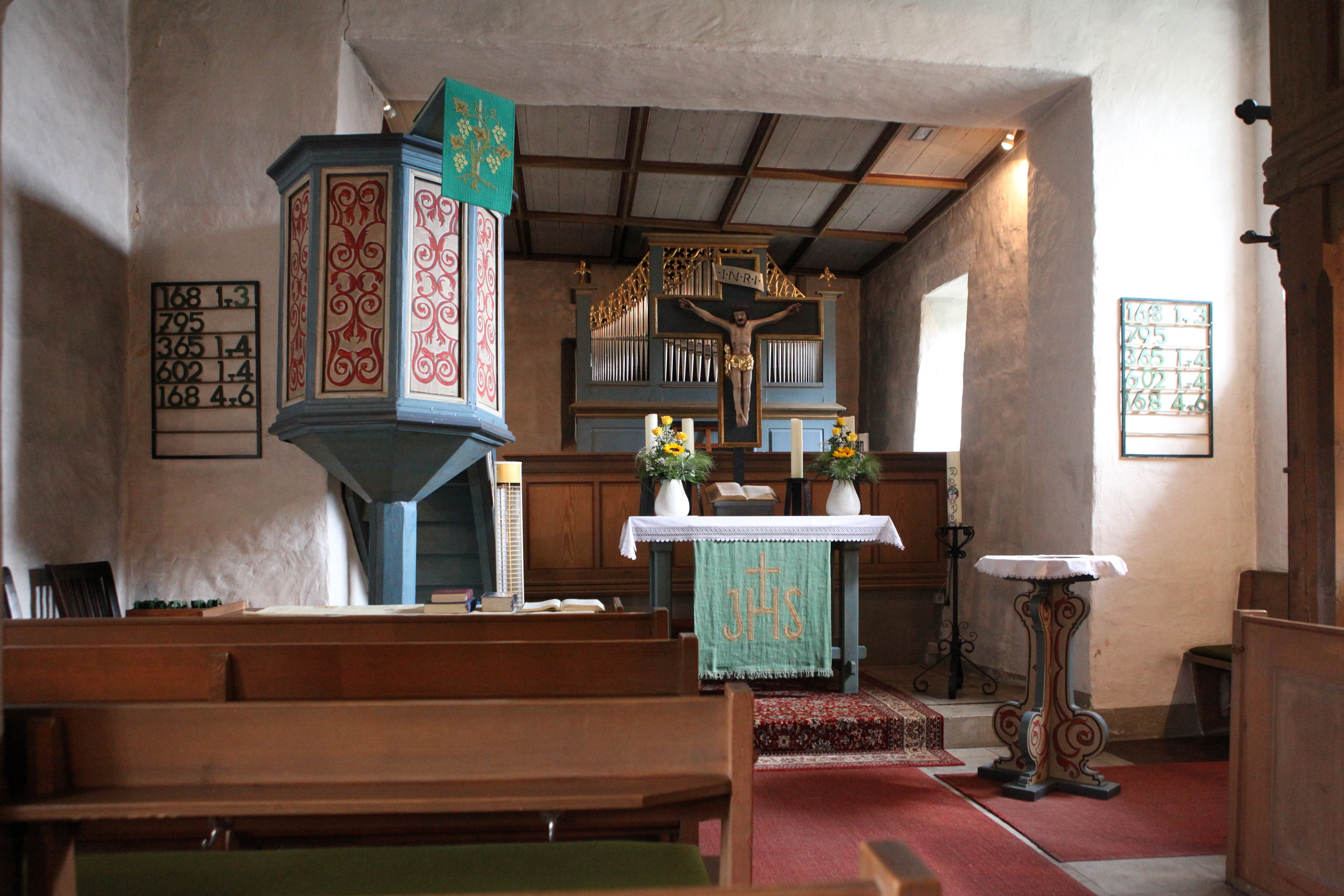 Evangelische Johanniskirche in Neukirchen, Gemeinde Lautertal, Landkreis Coburg